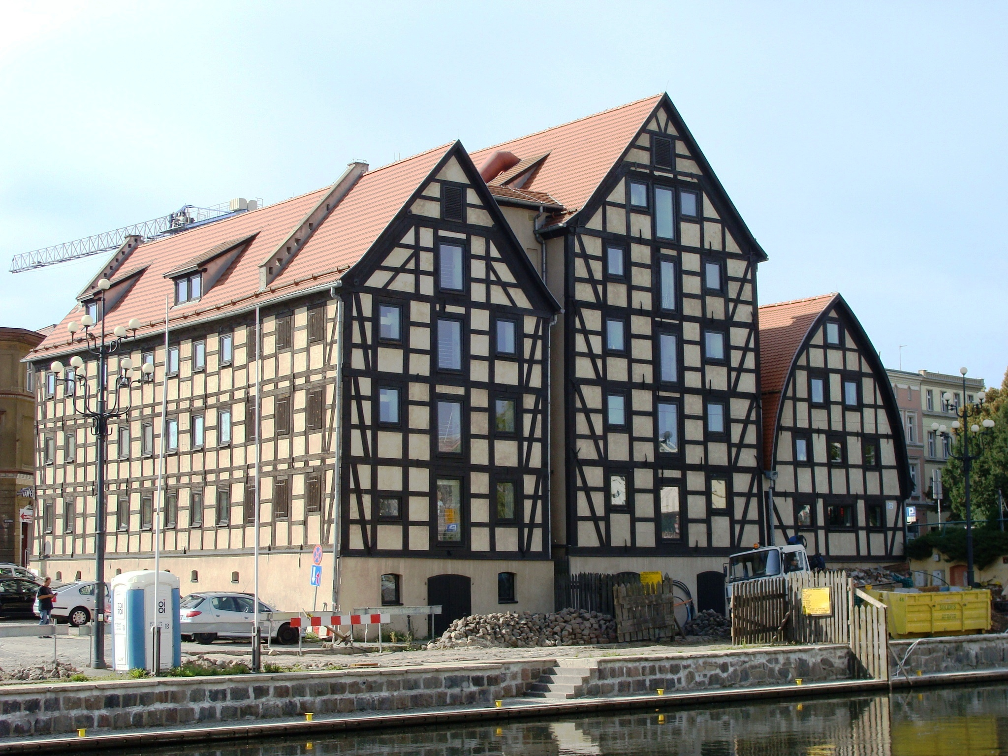 Bydgoszcz, spichrz, 1793